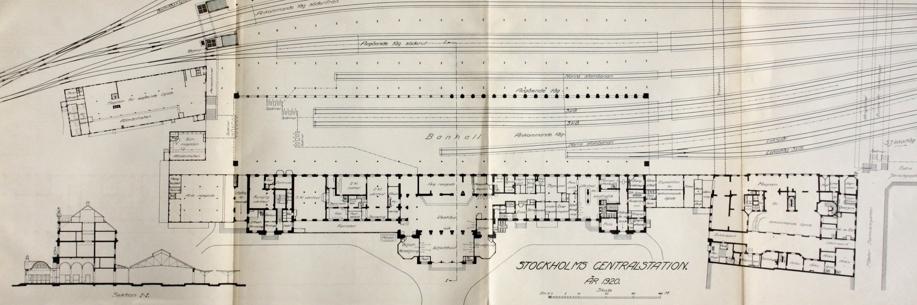 Stockholms central planritning från 1920